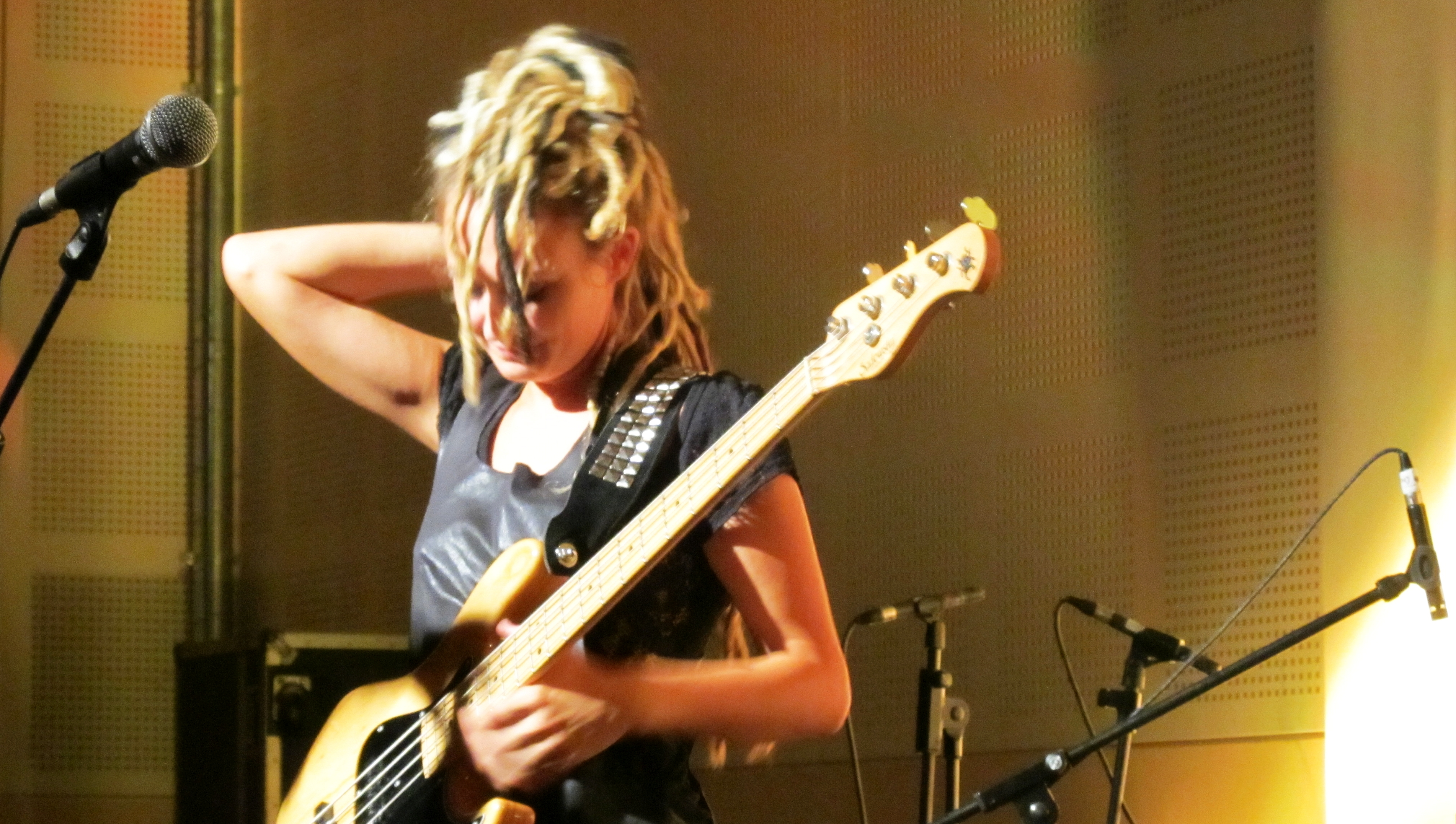 Concerto Artisti valdostani per l'Emilia (Cittadella di Aosta, 8 luglio 2012): Naïf Hérin